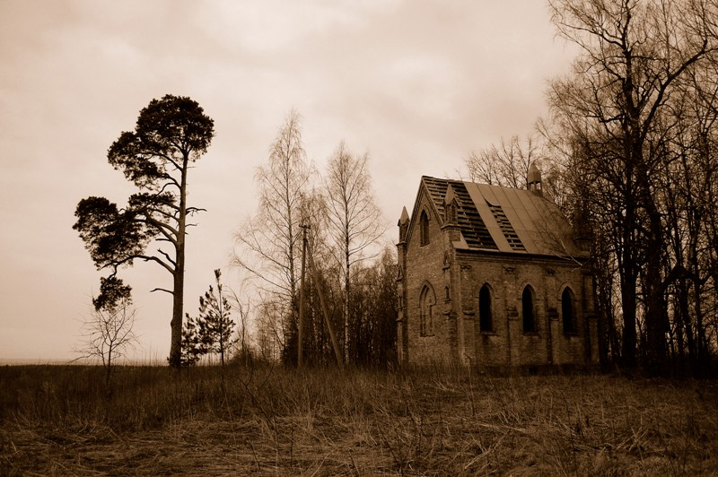 Koplyčia Antakalnis I kaime